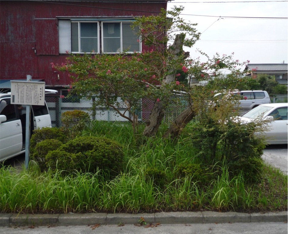 藤代本陣跡の説明看板と本陣玄関前にあった百日紅の木